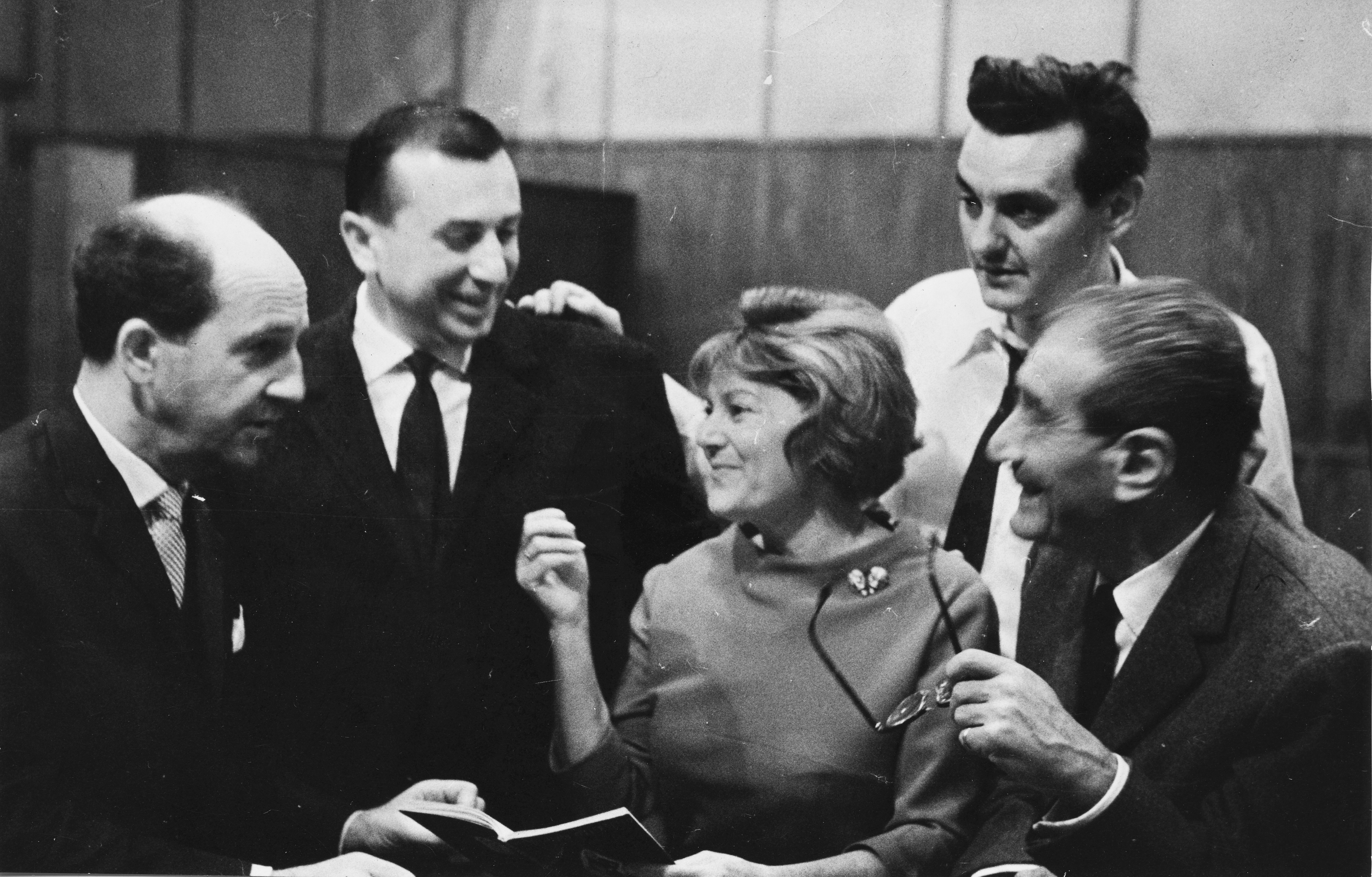 Rádiószilveszter, balról jobbra: Brachfeld Siegfried, Szilágyi György, Turay Ida, Marton Frigyes, Békeffi István. Location: Hungary Title: Rádiószilveszter, from left to right: Brachfeld Siegfried, Szilágyi György, Turay Ida, Marton Frigyes, Békeffi István.